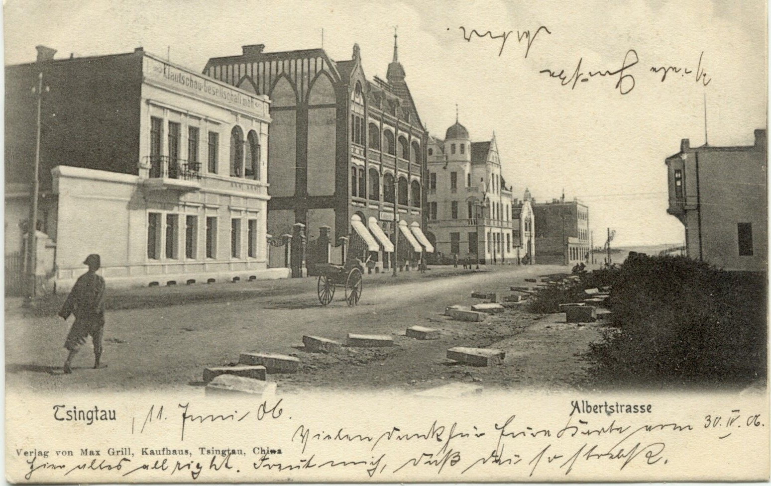 青岛安徽路罗达利洋行与邮局